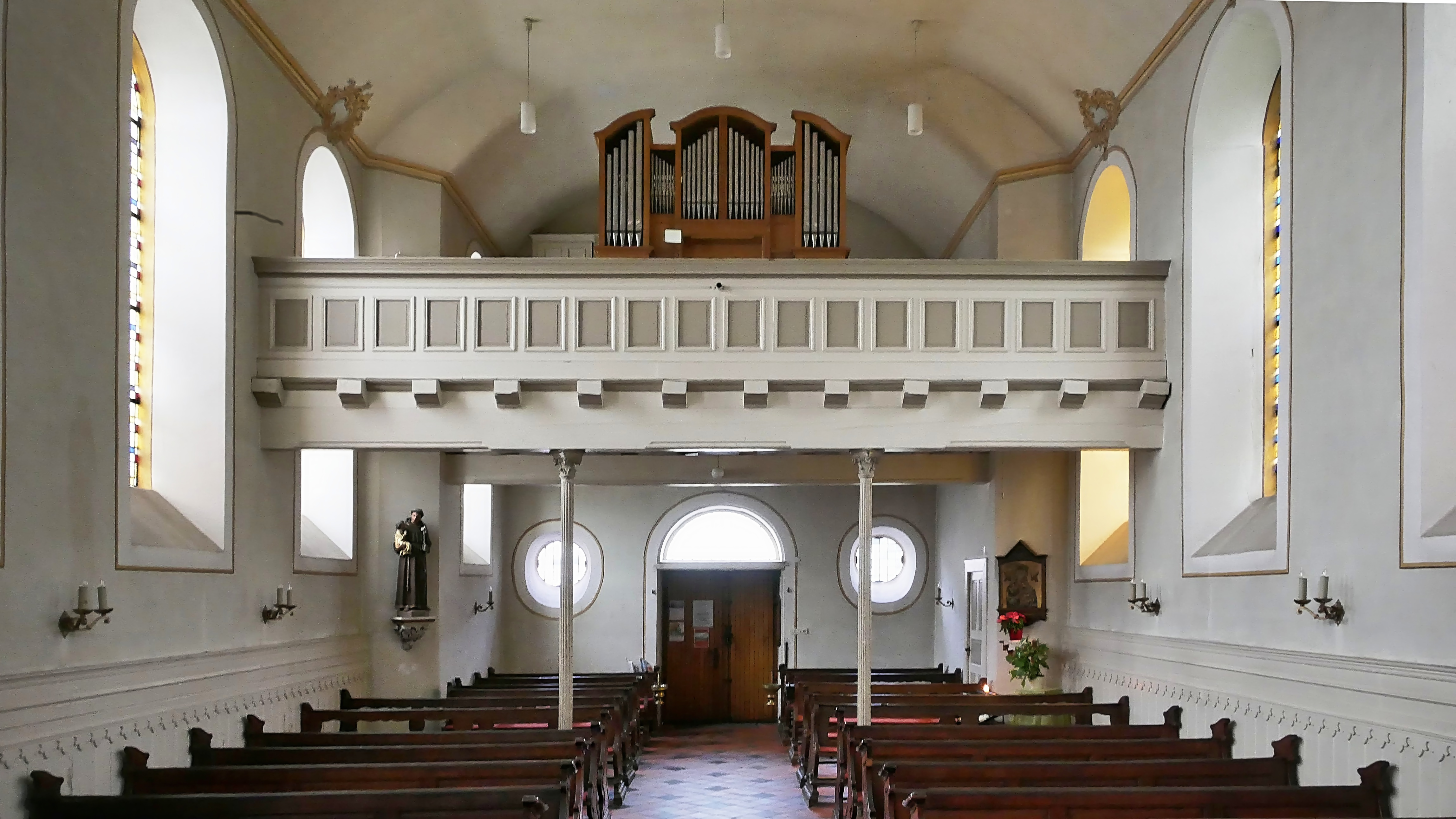 St. Simeon und Juda (Trier-Pallien), Blick zurück zur Orgel